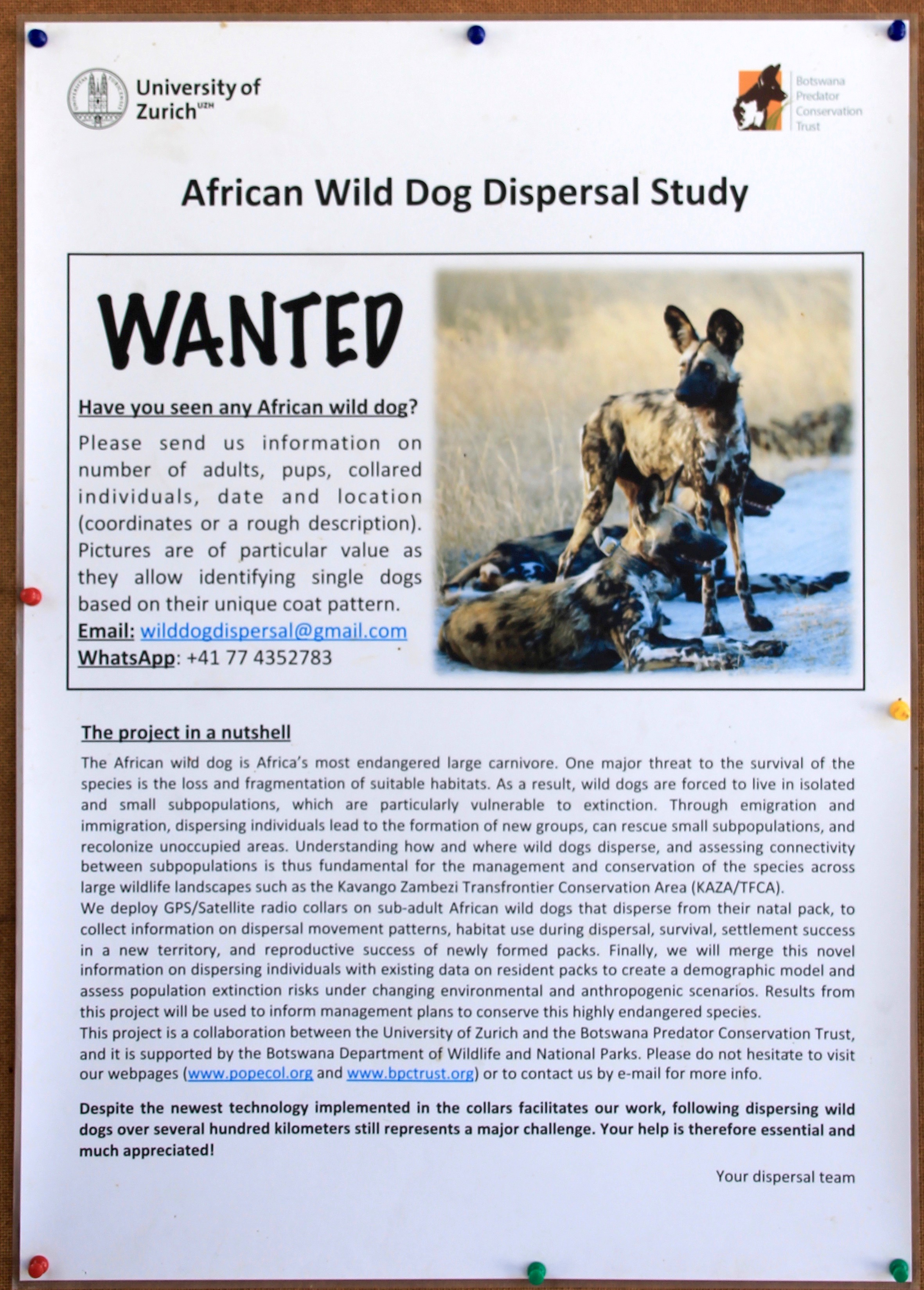 Road sign in Afrikanischer Wildhund